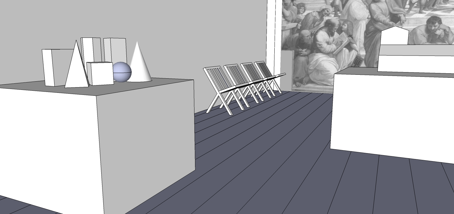 Vista prospettica della sala mostra Architettura-Idea, progettata da Luca Meda e presentata all'interno della mostra Il progetto di architettura alla XVI edizione della Triennale di Milano